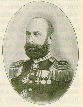 Полковник Иван Розенбом, командир на 17-ти Архангелогородски пехотен полк в периода 1873-1877